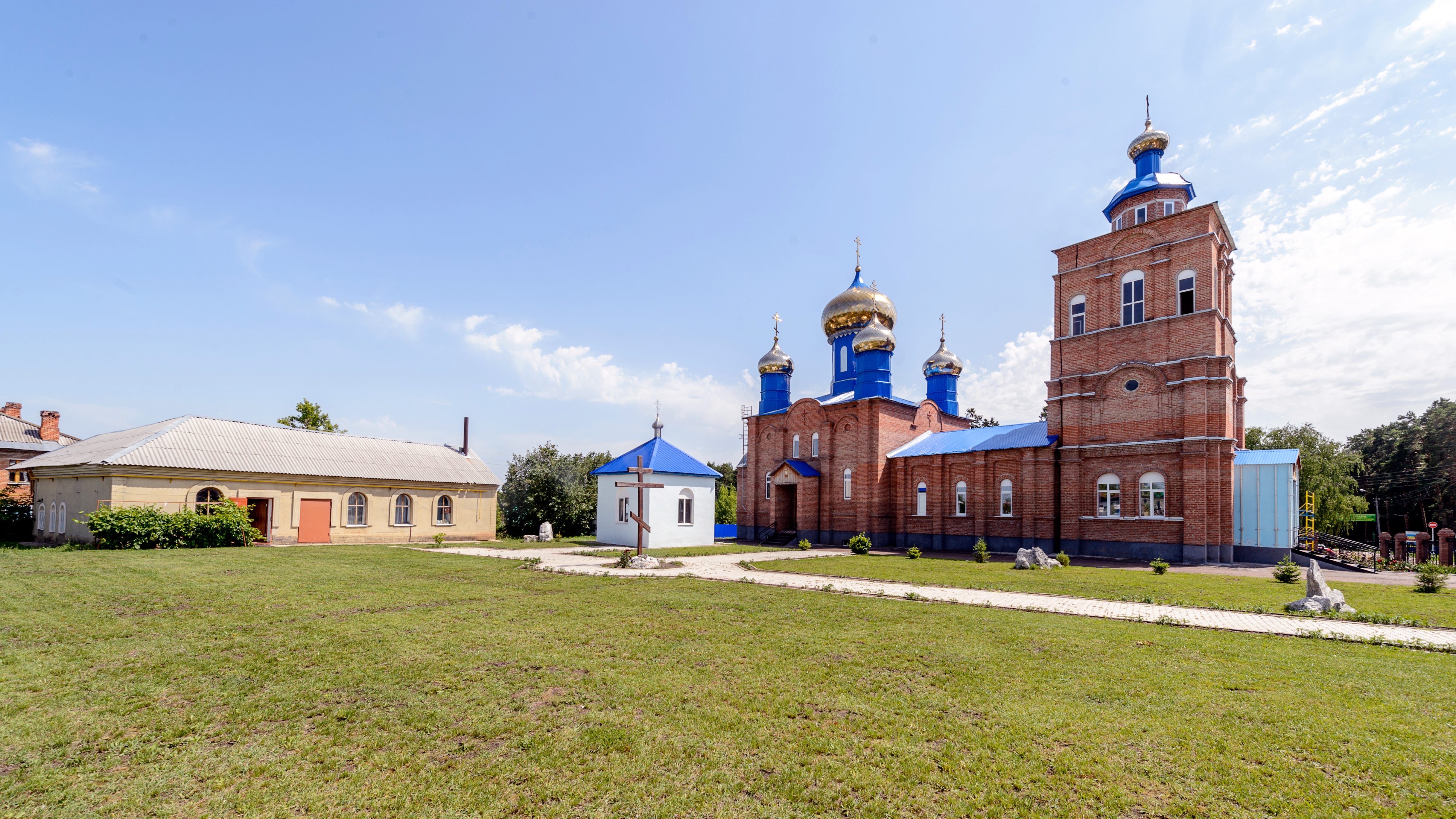 St. Tikhon's Church